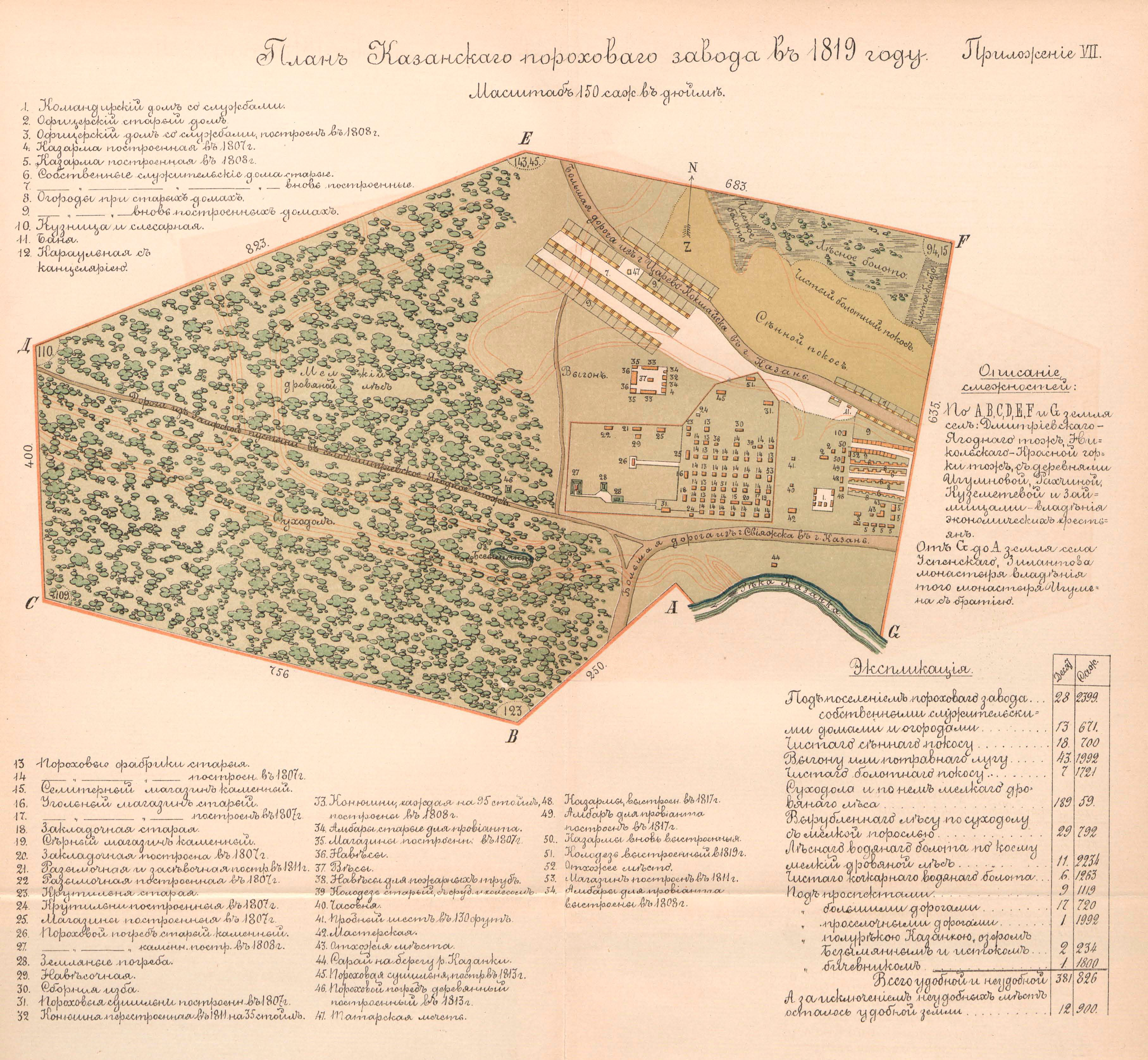 План Казанского порохового завода в 1819 году. Из книги: Глинский А. С. 100 лет Казанского порохового завода. - СПб.: Типография "Артиллерийского Журнала", 1888. - Приложение VII.